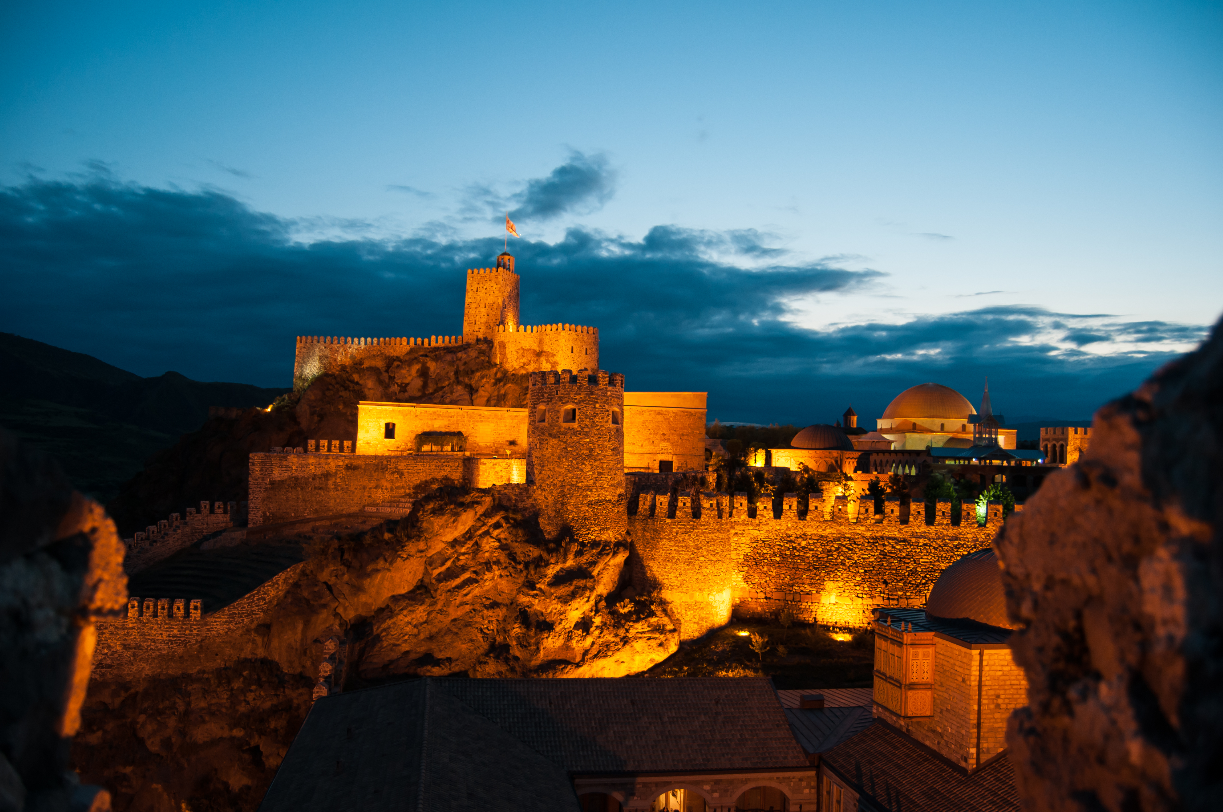 Rabat Fortress Akhaltsikhe